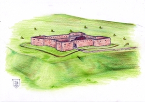 Székelybánja vára, amely egy generáción keresztül az elnyomást jelképezte a székelyek szemében, Háromszék közepén emelkedett. Építése az 1562. évi székely felkeléshez és az azt követő segesvári országgyűlés határozataihoz köthető, feladata inkább a belső rend fenntartása és a székelyek megtörése, mint a külső ellenség visszaverése volt. A vár kora várépítészeti csúcstermékének számított, de alig negyed évszázaddal felépítése után dicstelen véget ért. A háromszéki székelyek Mihály vajda beleegyezésével lerombolták, olyannyira, hogy ma már csak félig betemetődött árkai figyelhetőek meg, falainak nyomai nem láthatóak.